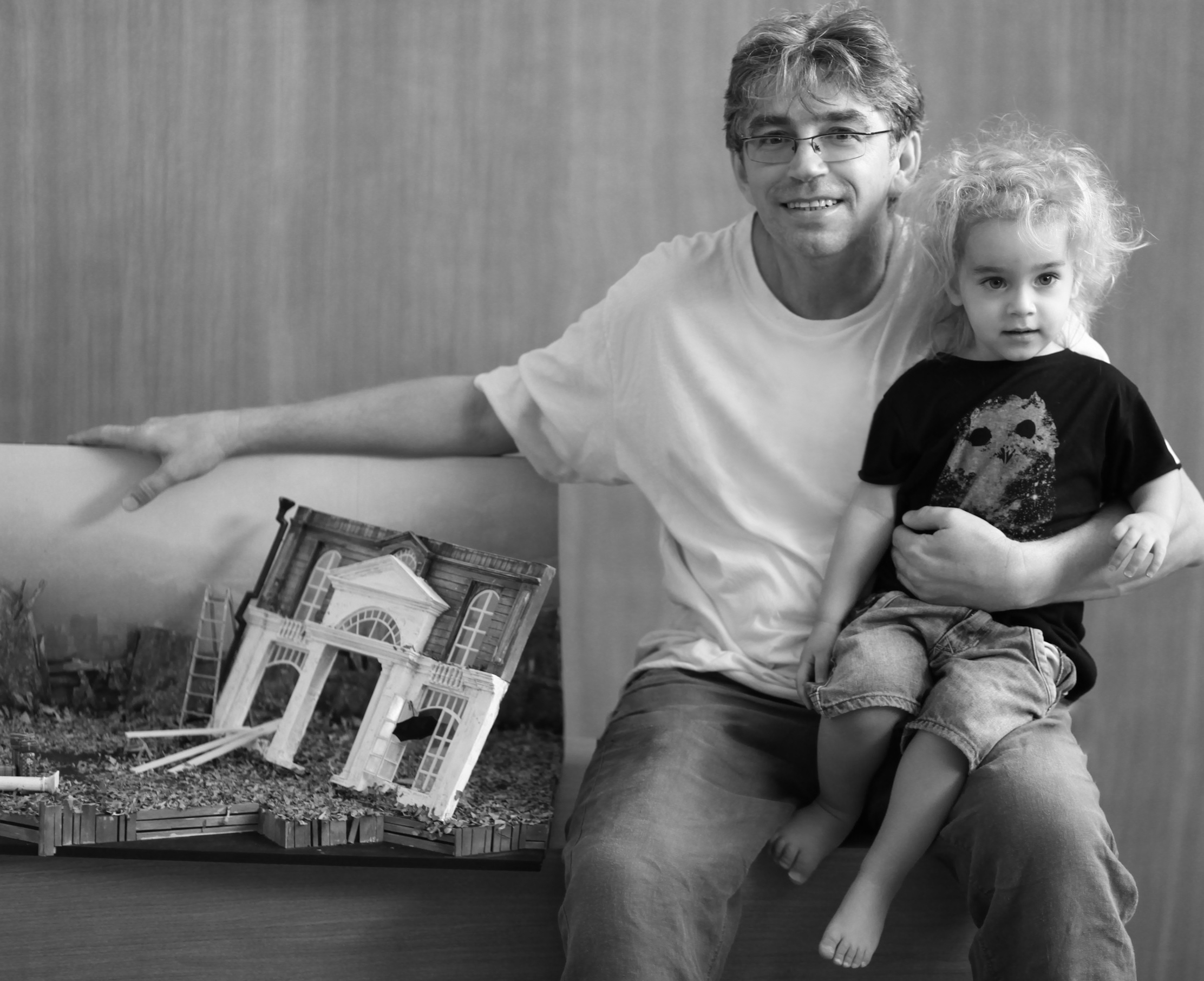 אלכסנדר ליסיאנסקי